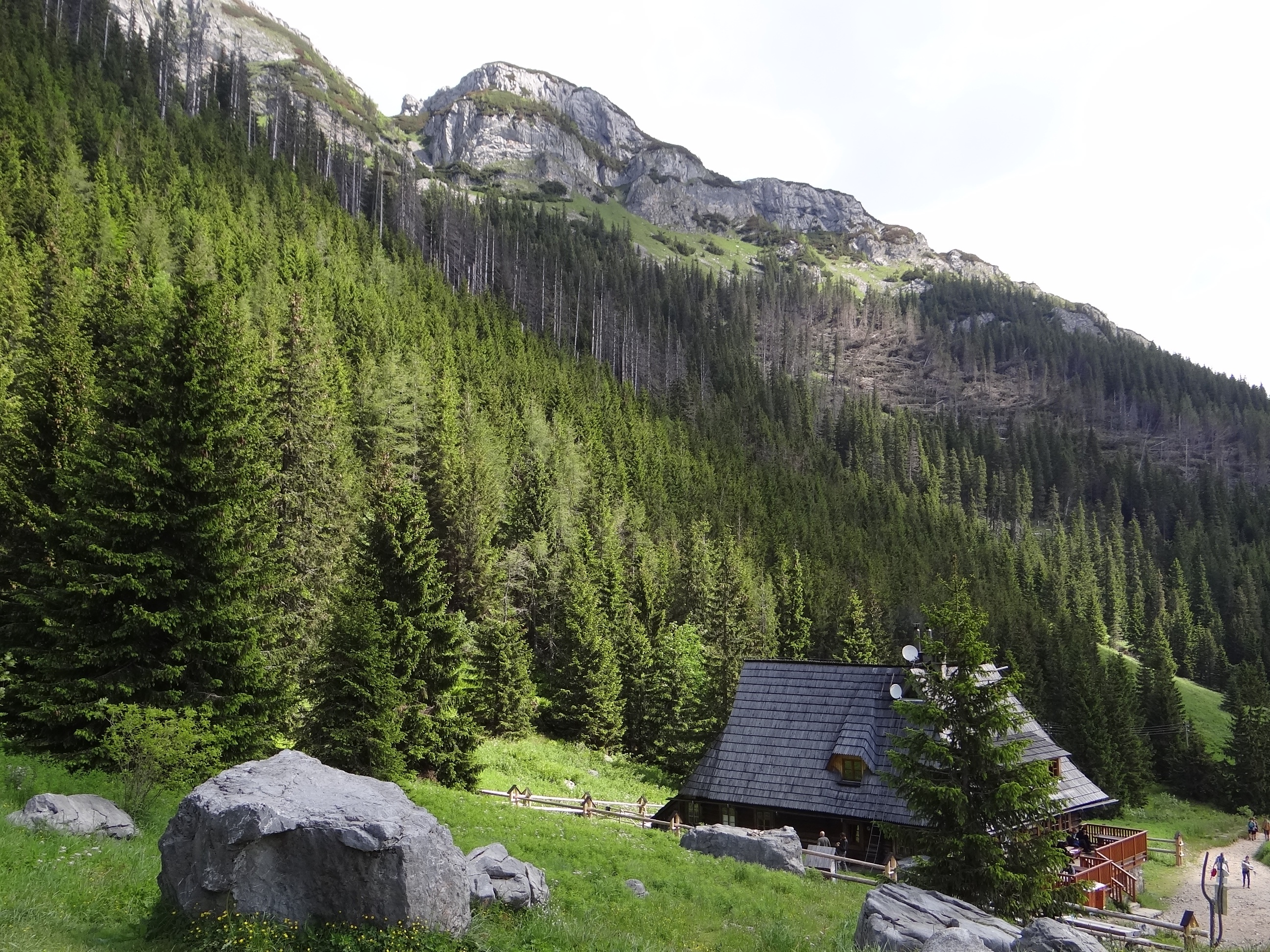 Schronisko PTTK na Dolinie Kondratowej, u góry przełęcz Wrótka i Kalacka Kopa